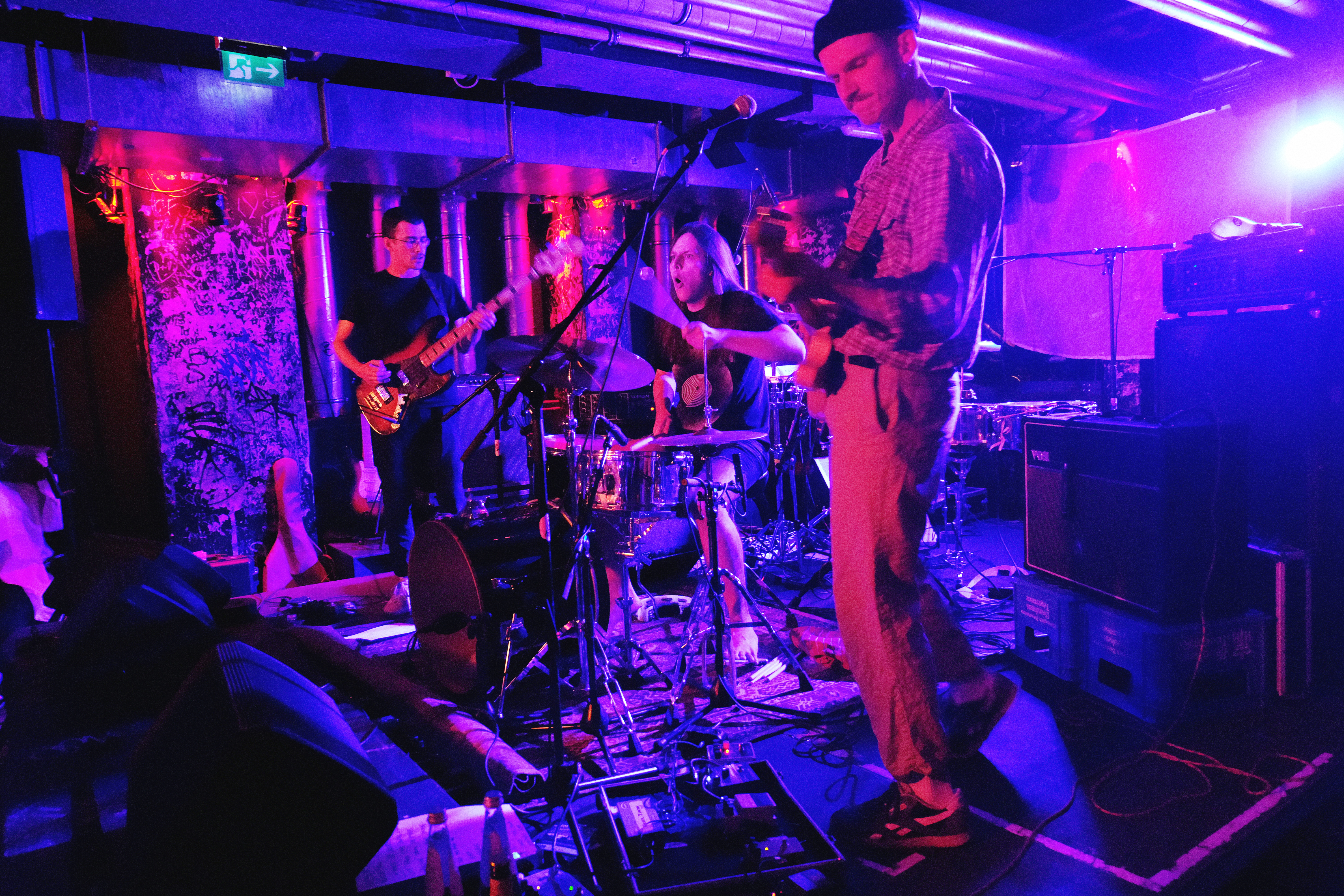 Die Wolf Mountains in der Roten Sonne (2019): v.l.n.r: Thomas Zehnle, Kevin Kuhn, Reinhold Emerson